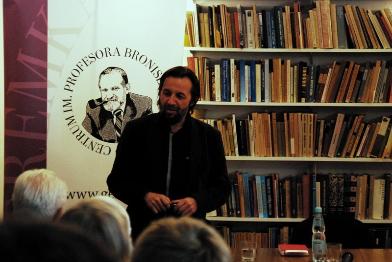 Wykład w siedzibie Fundacji: Pogranicze i pragmatyka etosu n/z: Krzysztof Czyżewski photo: Monika Lisiewicz